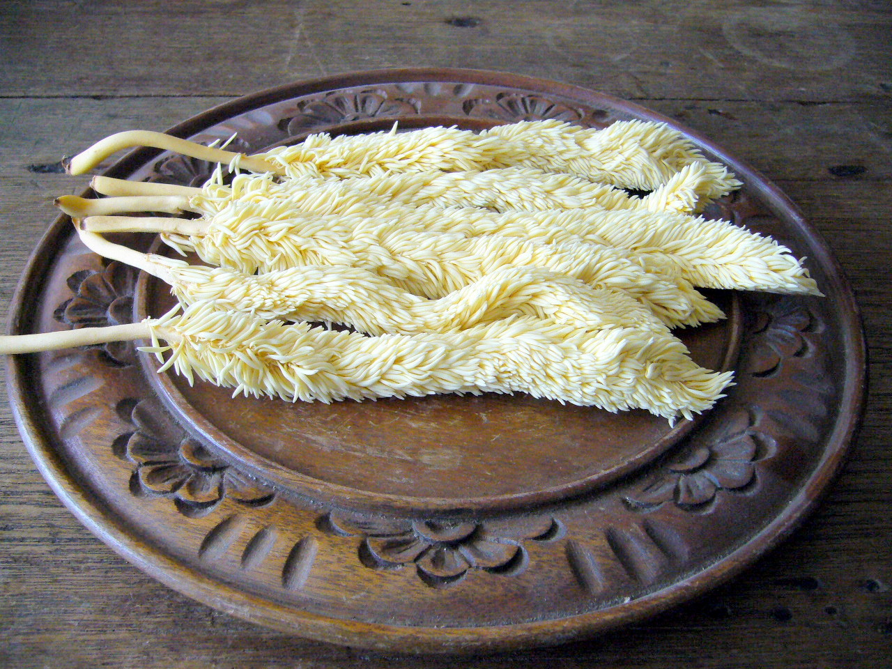 Corozo, planta aromática utilizada en festividades guatemaltecas, no es comestible